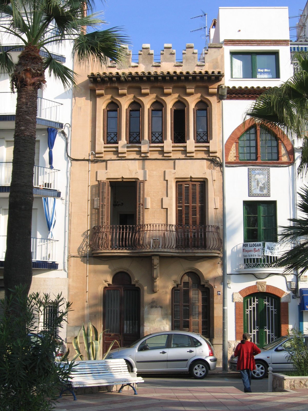 Casa Isabel Ferret, passeig de la Ribera 29, Sitges